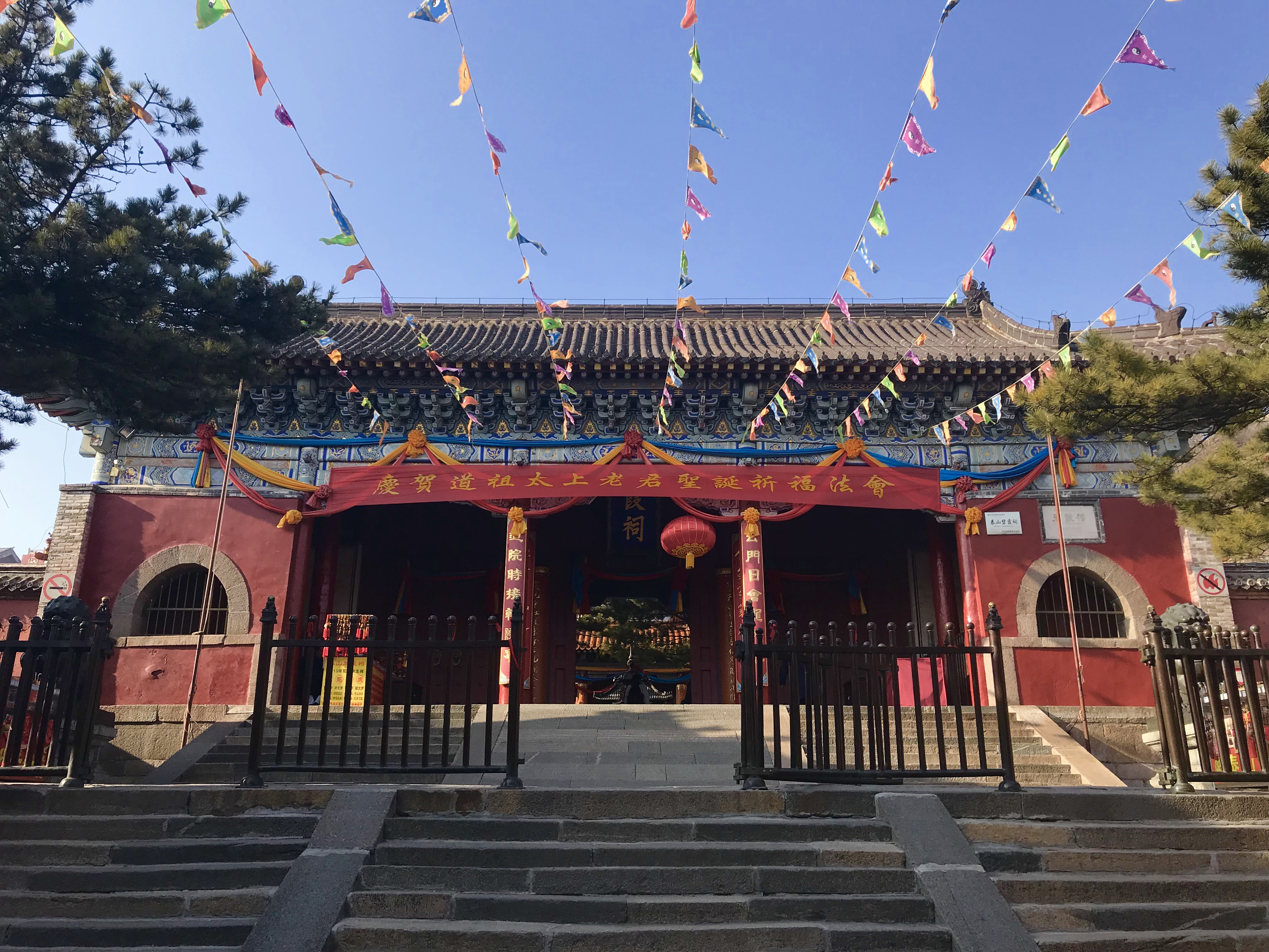 中文（台灣）: 泰山碧霞祠